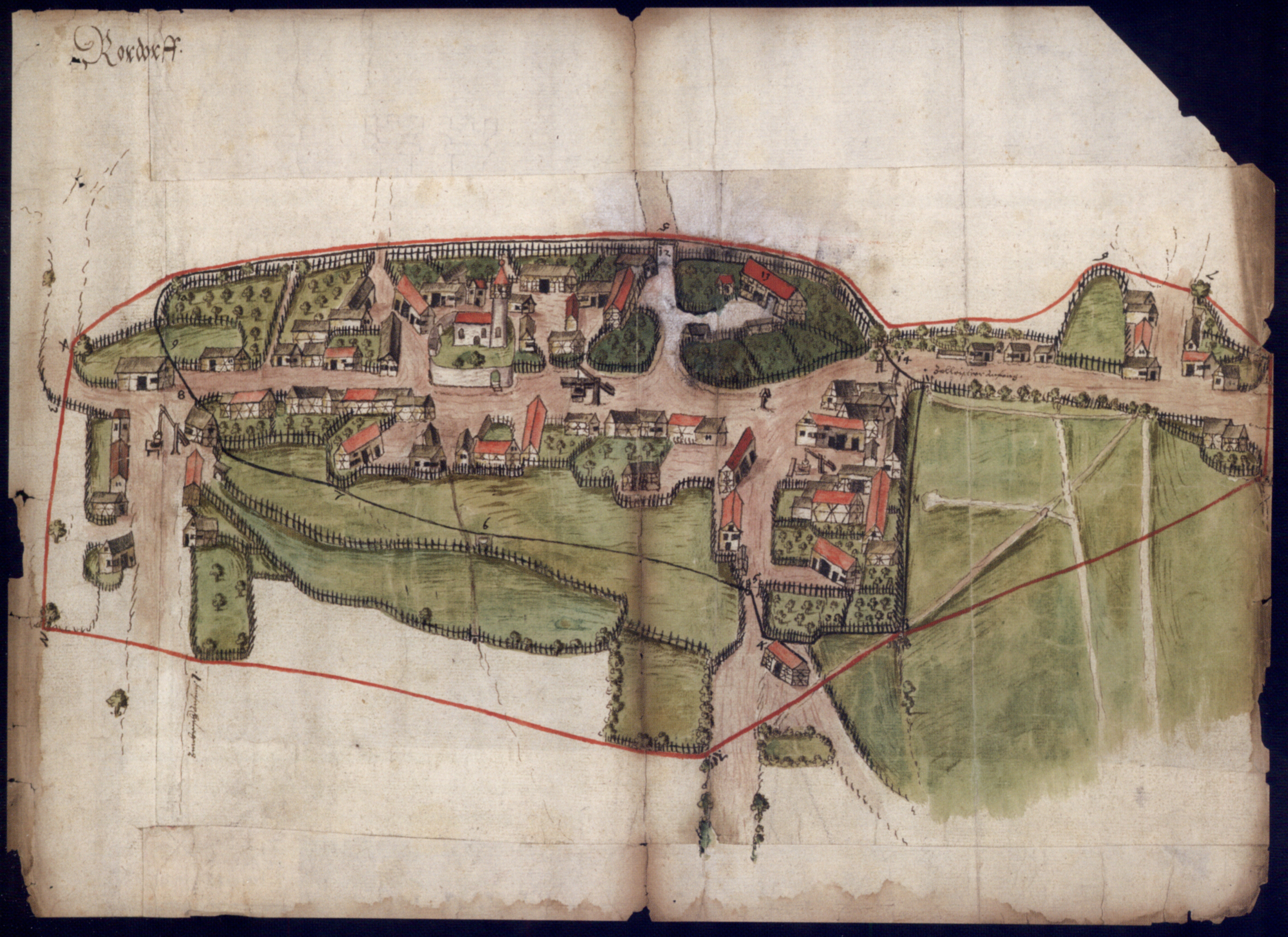 Ansicht des Dorfes Rohrdorf bei Meßkjirch auf einer Vogelschaukarte von 1576, Generallandesarchiv Karlsruhe J-B Rohrdorf/1